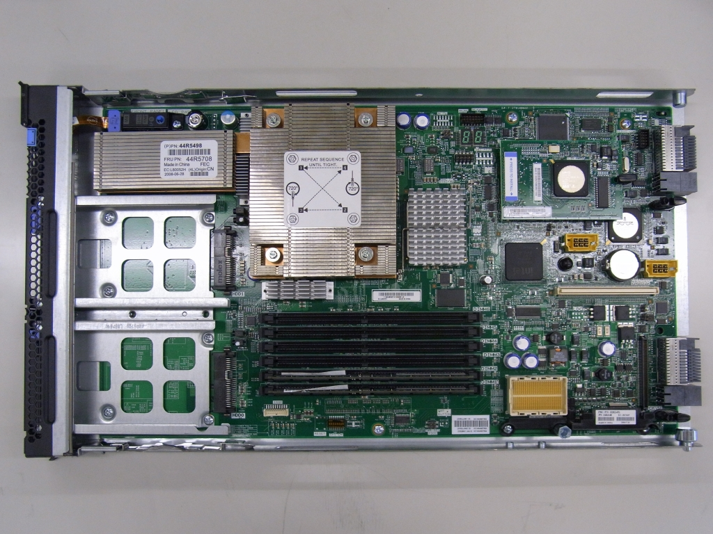 HS12